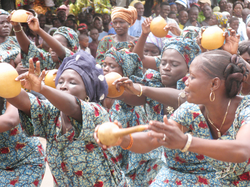 le Tchoukoutou est la boisson locale à base de mil. cette photo a été prise lors d'un défilé commémorant la fete nationale du Bénin